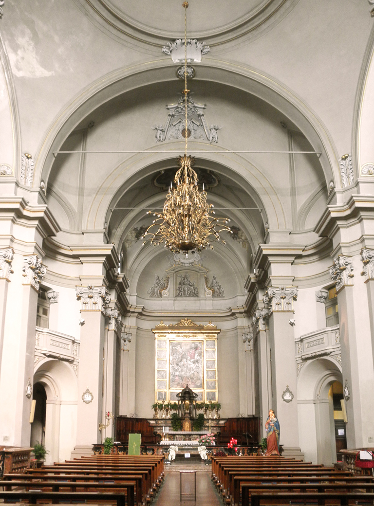 Interno della chiesa di Santa Maria del Sole a Lodi